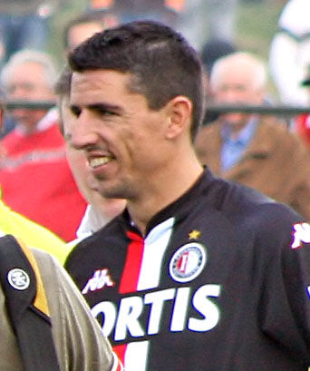 Roy Makaay (Feyenoord)